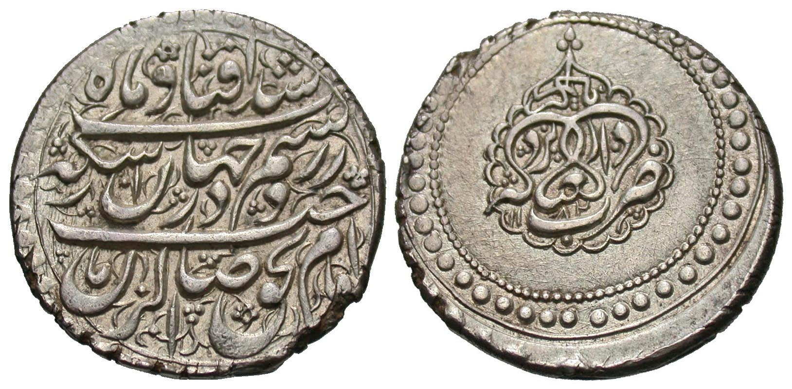 Two Abbasi Coin of Karim Khan; 9.22 g, 25 mm, 1184AH